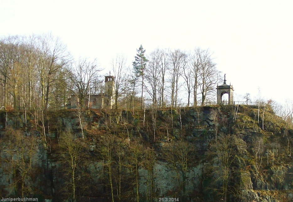 Pohled na šibeniční vrch s ruinou starokatolického kostela a vyhlídkovým altánem